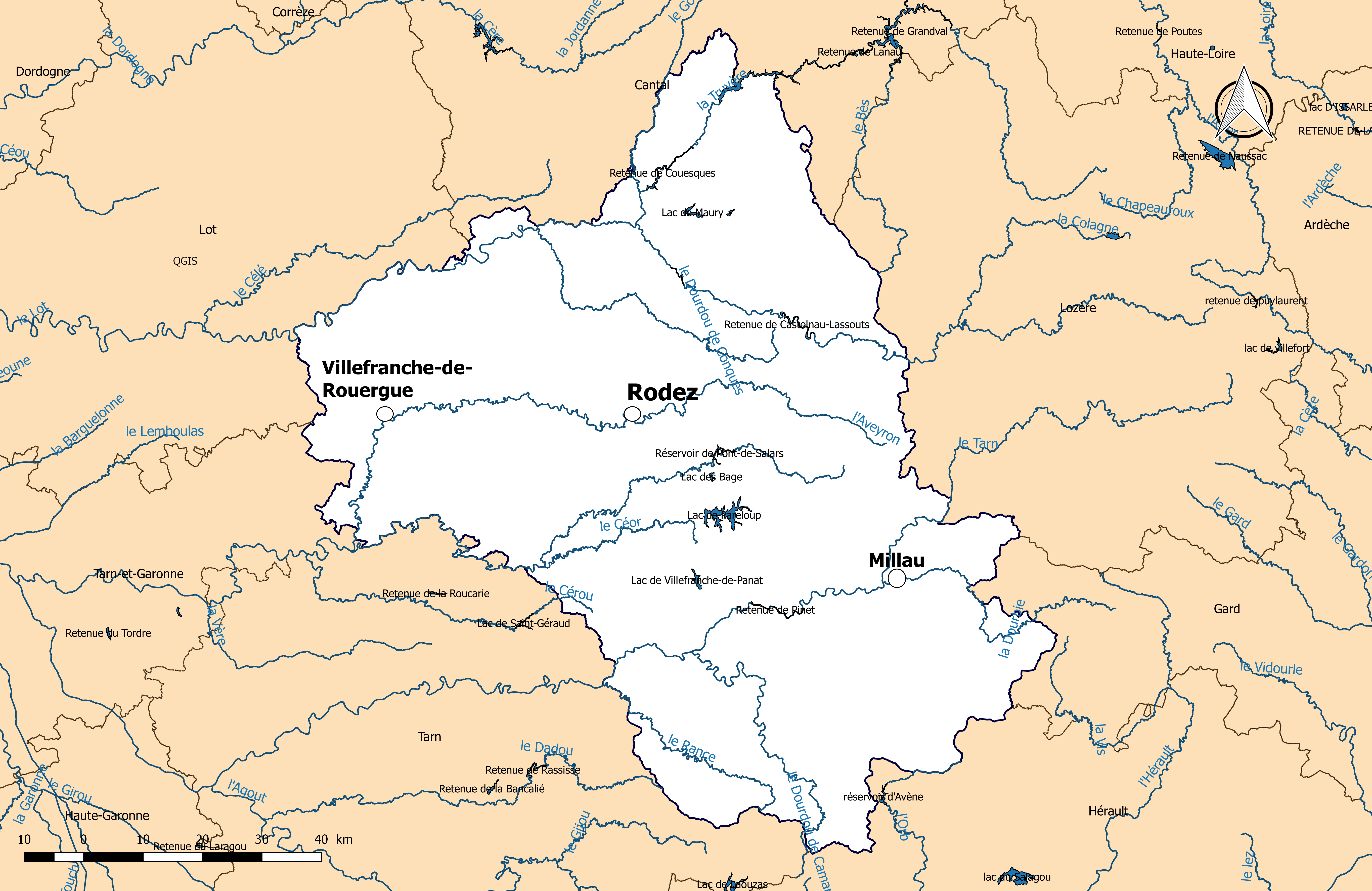 Carte des cours d'eau de longueur supérieure à 50 km dans le département de l'Aveyron (France), avec représentation des principales retenues d'eau.